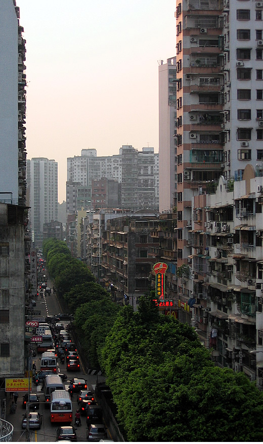 高士德大馬路。